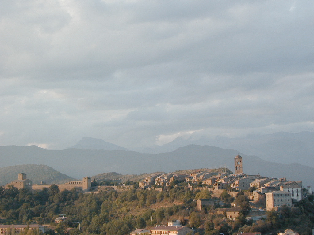 Vista de la villa de L'Ainsa y su castillo en la parte izquierda